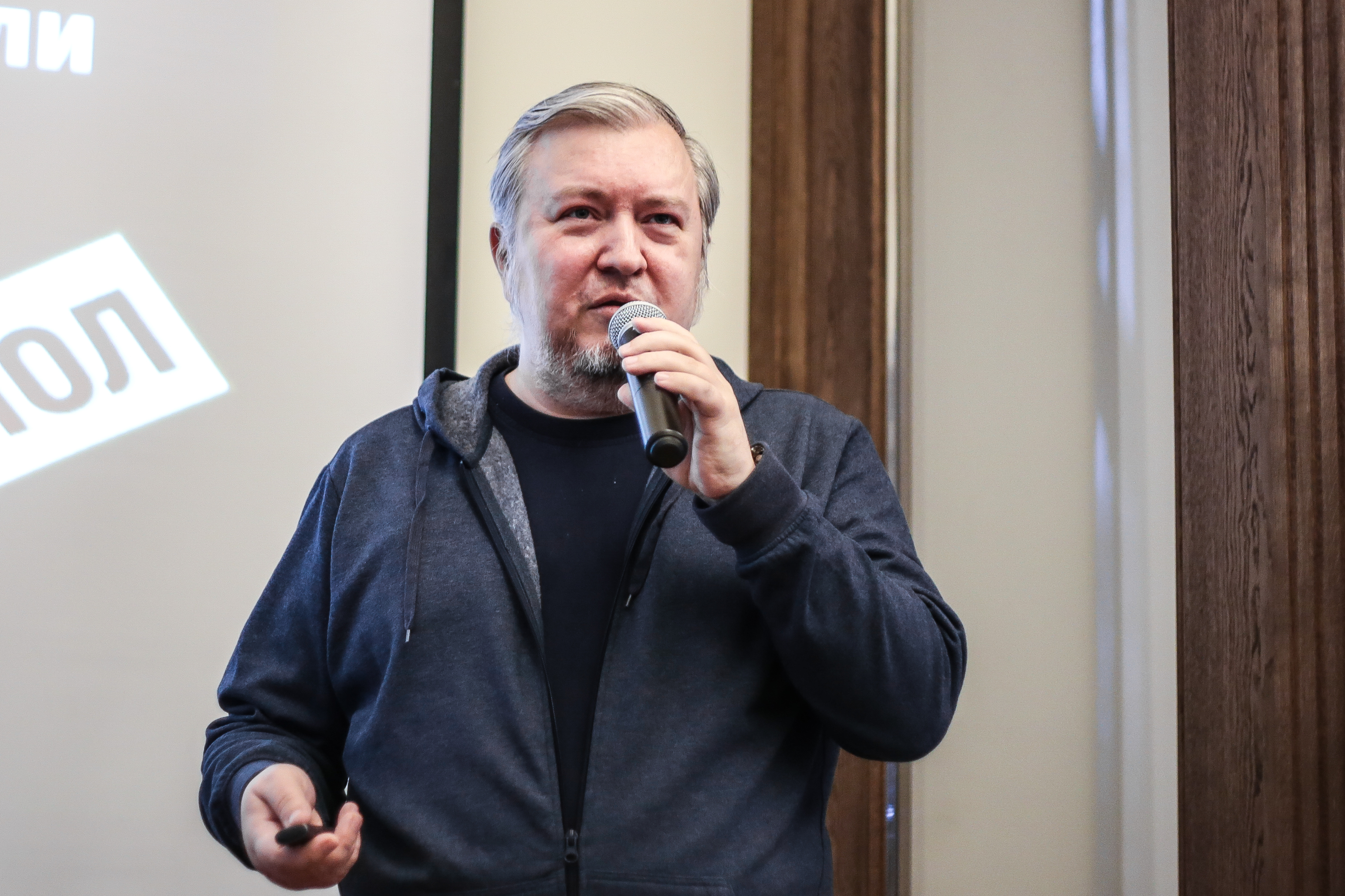 Алексей Водовозов читает лекцию "Новогодняя алкогольная" о распространённых мифах, связанных с алкогольными напитками. 08.01.2018.